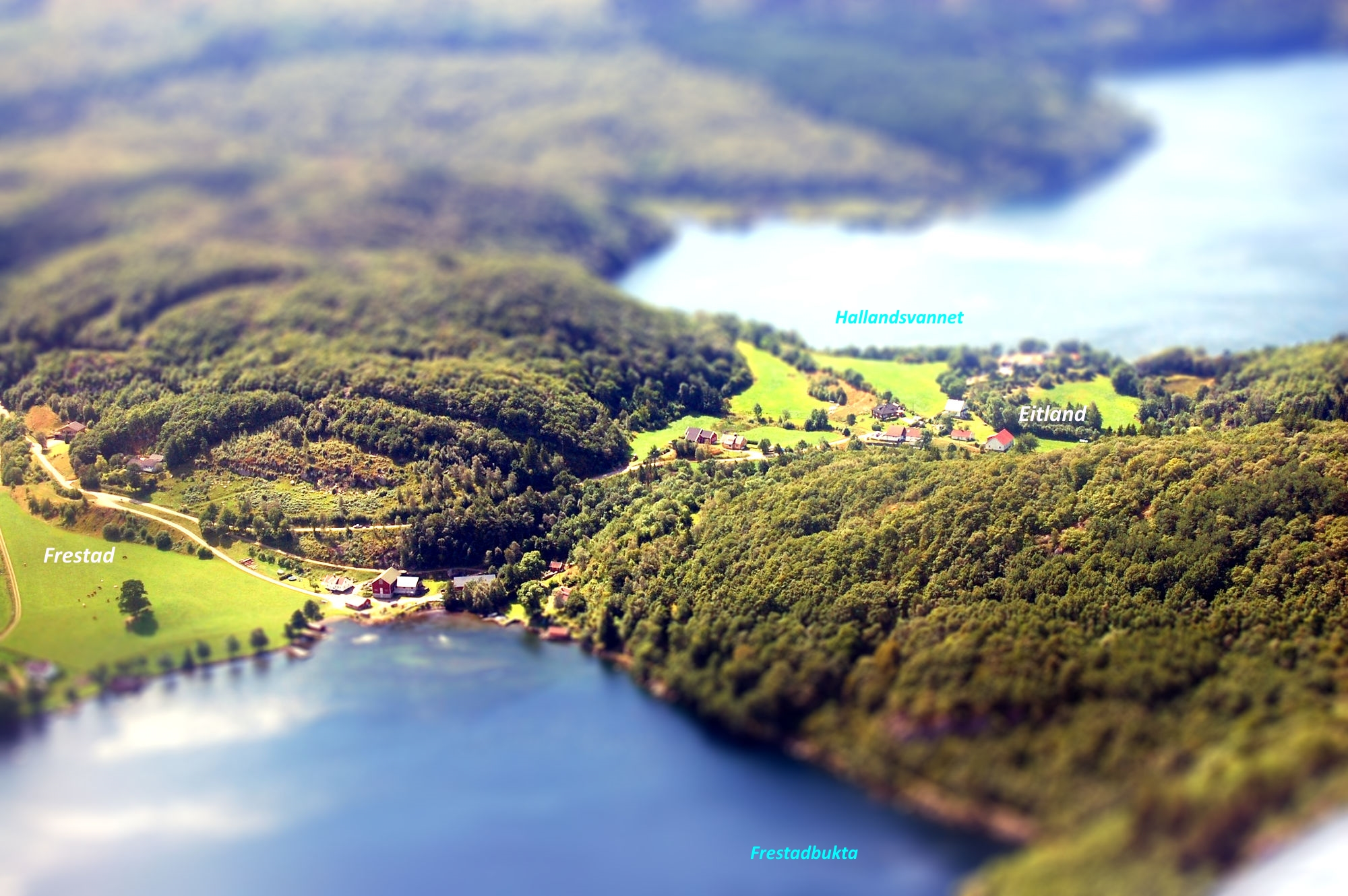 Flyfoto av Frestad og Eitland på Lista. Med navn på områder. Effekt: Tilt-shift